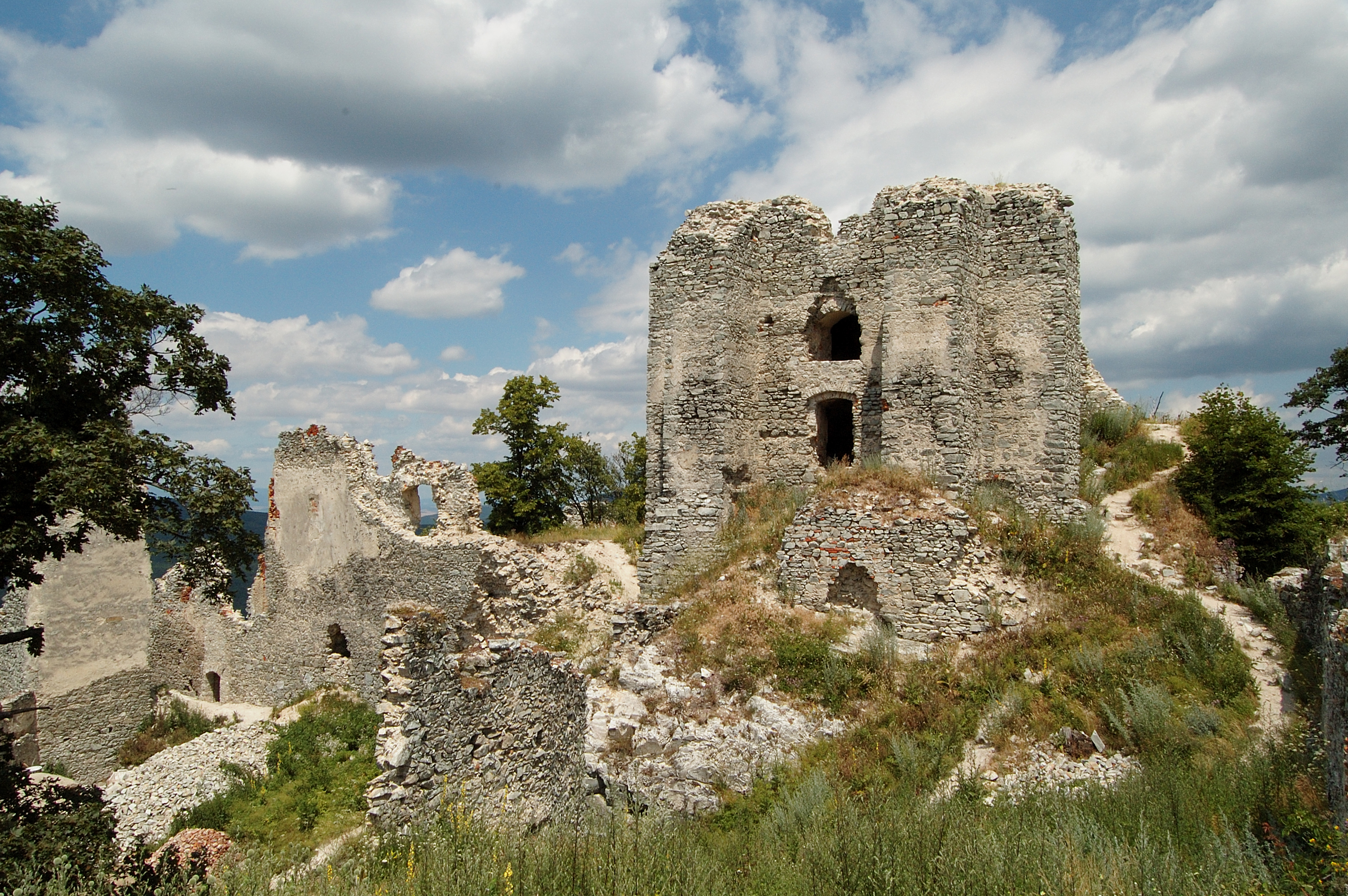 obytná veža, ranogotický donžon